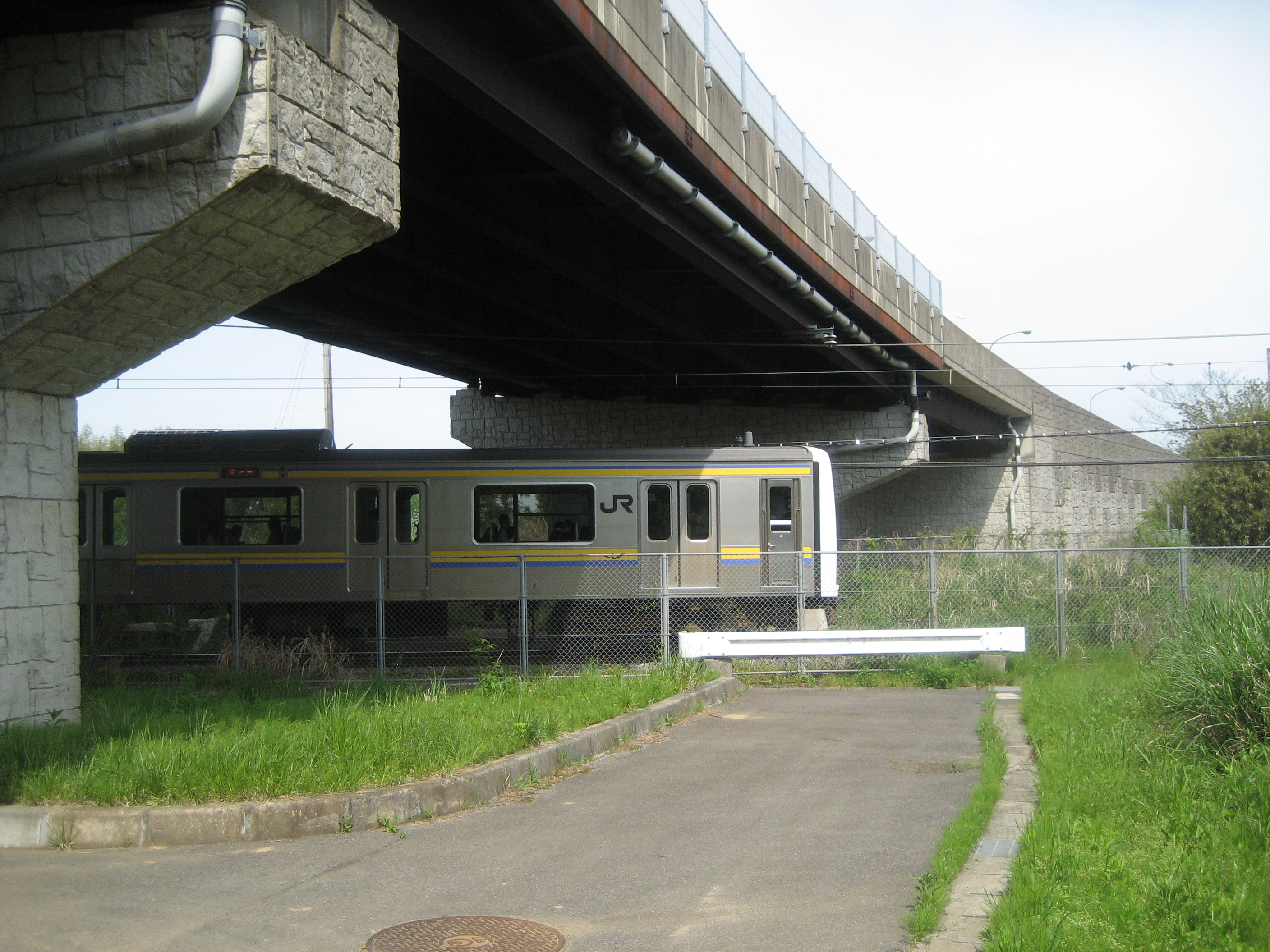 千葉県道103号線成田市大菅跨線橋とJR成田線との交差部分